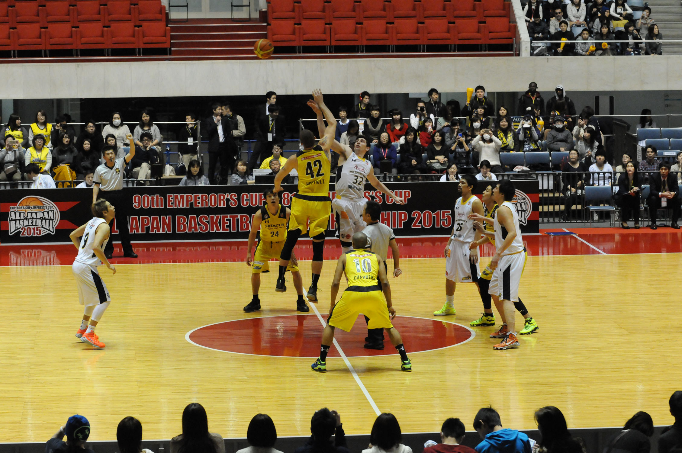 2015年全日本総合バスケットボール選手権大会準々決勝、リンク栃木ブレックス対日立サンロッカーズ東京。代々木第一体育館で。